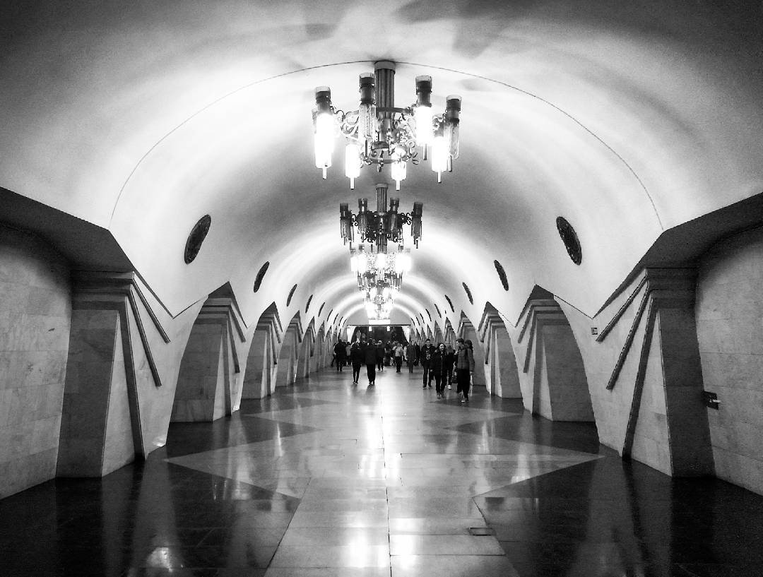 Станція метро Пушкінська (2017 рік) Автор фотографії Євгеній Мовчун